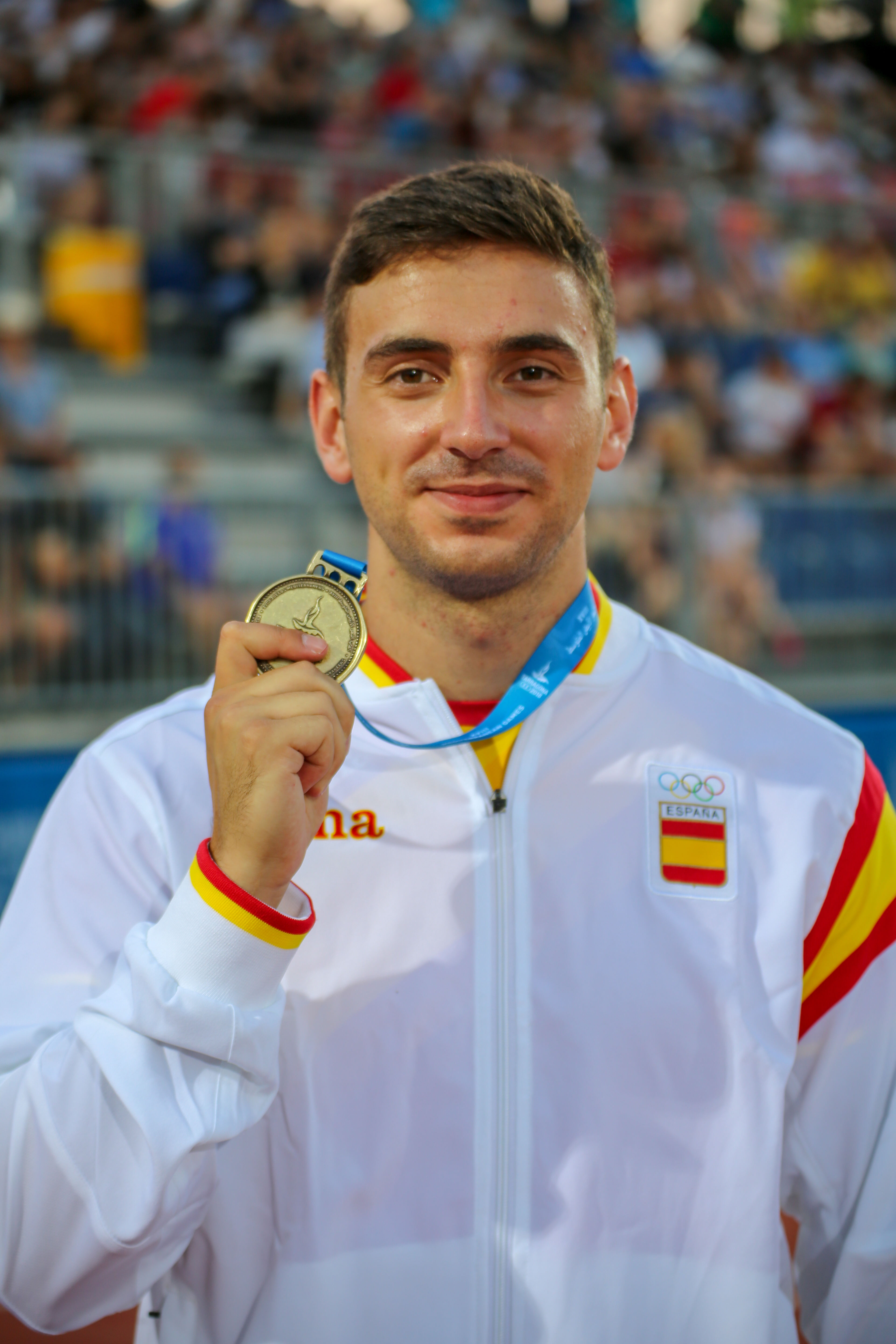 Nicolás Quijera